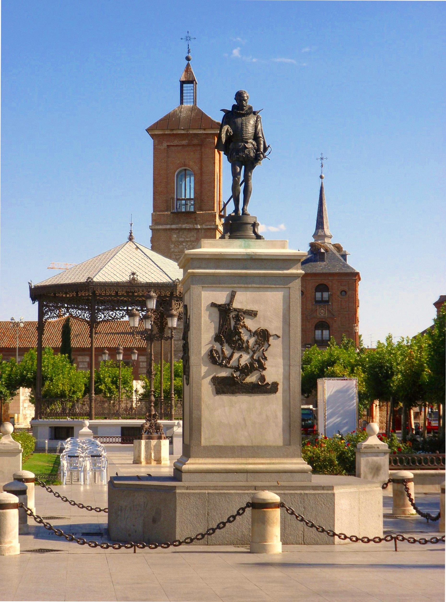 Alcalá de Henares, España.